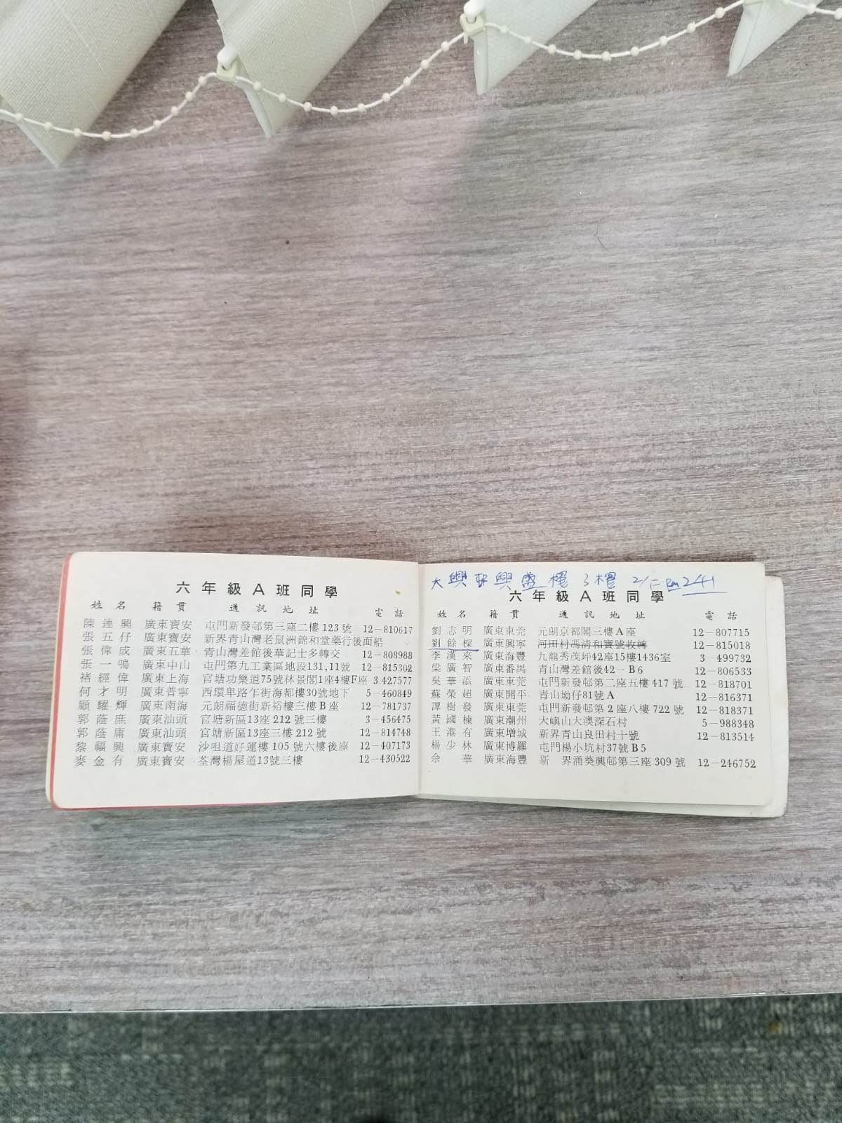 郭蔭庶郭蔭庸兄弟在六年級的紀念冊，內附當時住宅及籍貫